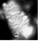 Nanolito incertae saedis,un Nanocónido del Jurásico Superiór (Tithoniano Superior) de una sección Superficial en la sierra Norte de Puebla, México. Barra de referencia 1 micra. (Avila,2005).